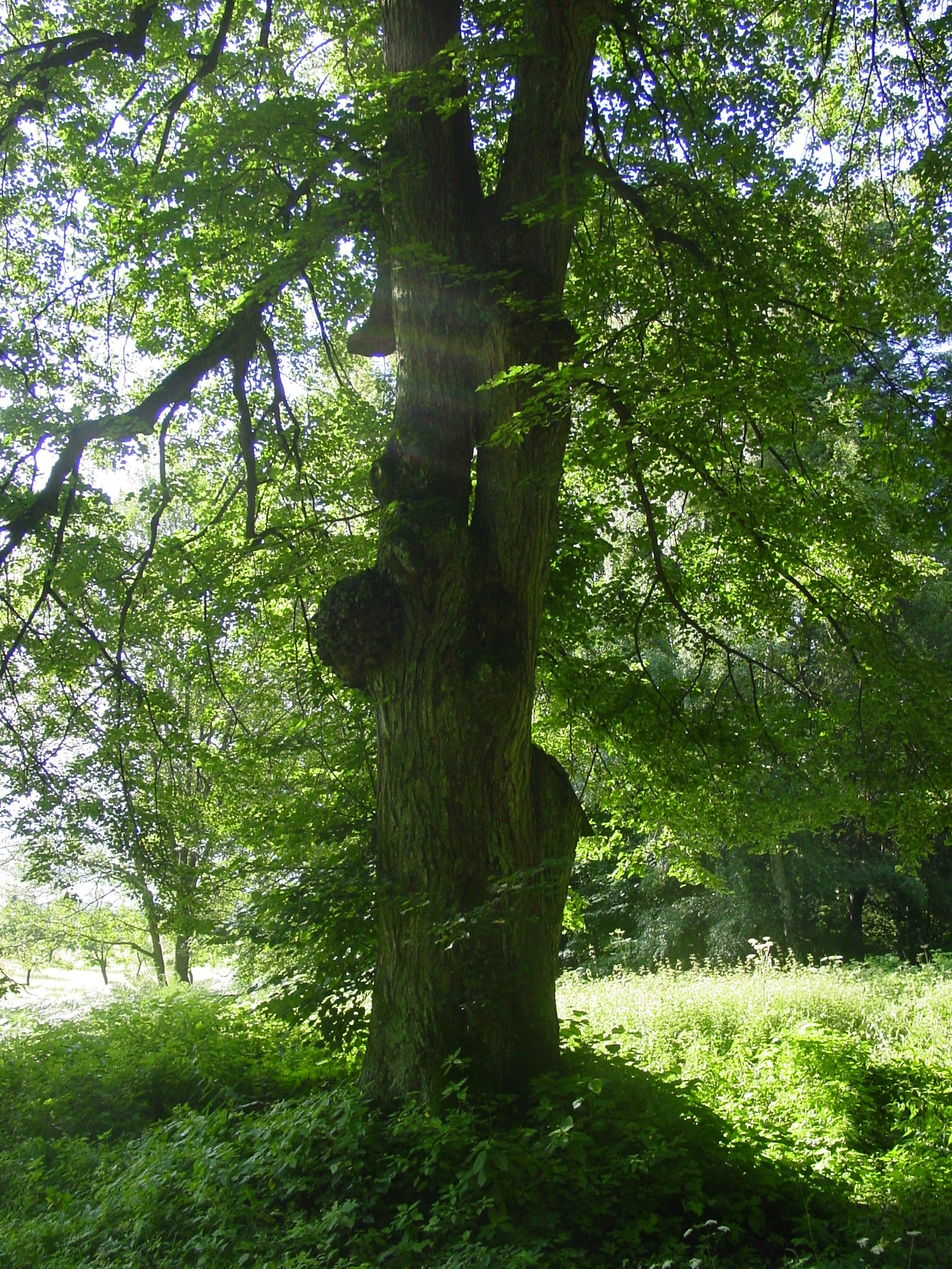 Husitská lípa na Ostaši